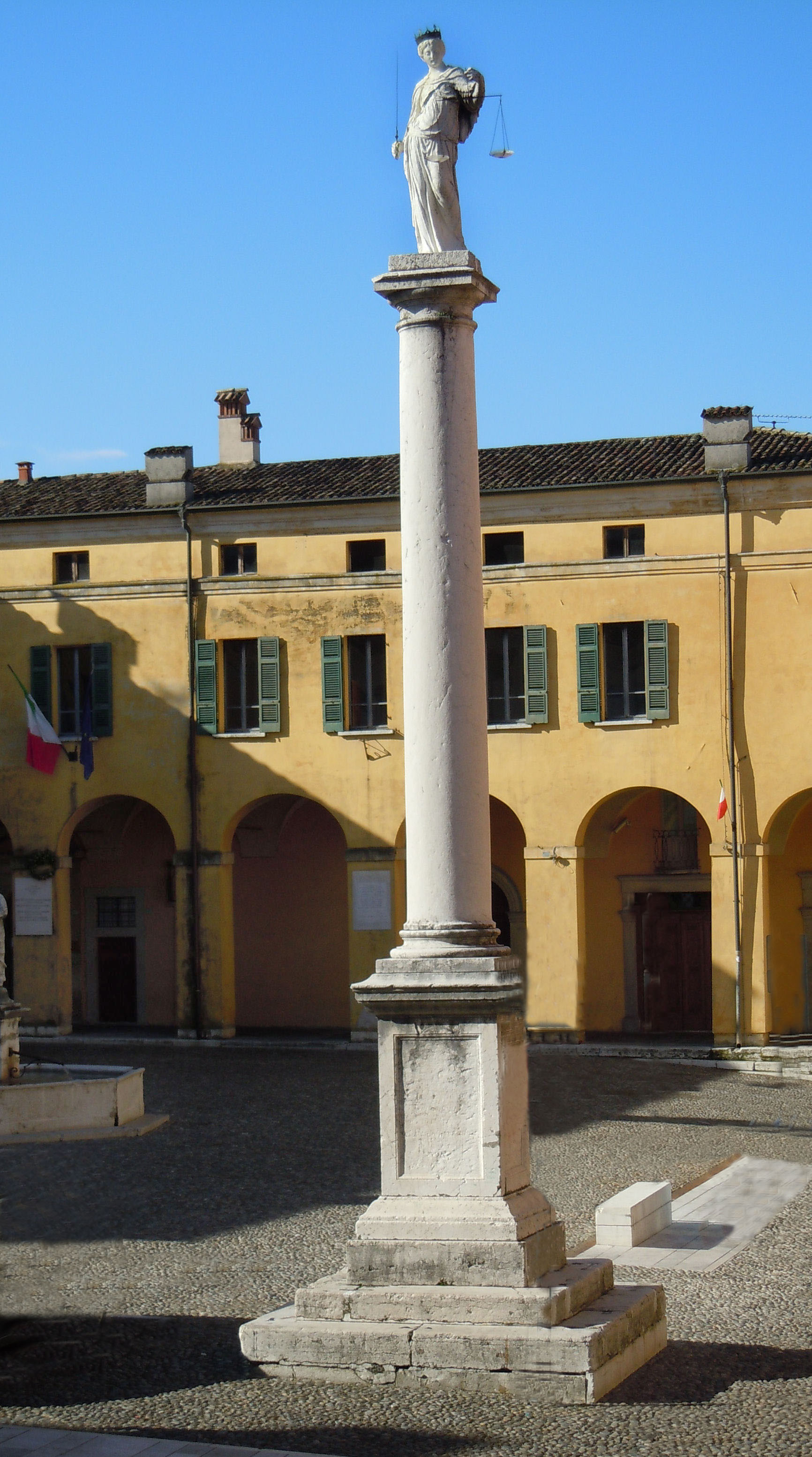 Castiglione delle Stiviere, colonna della Giustizia, in piazza Dallò.